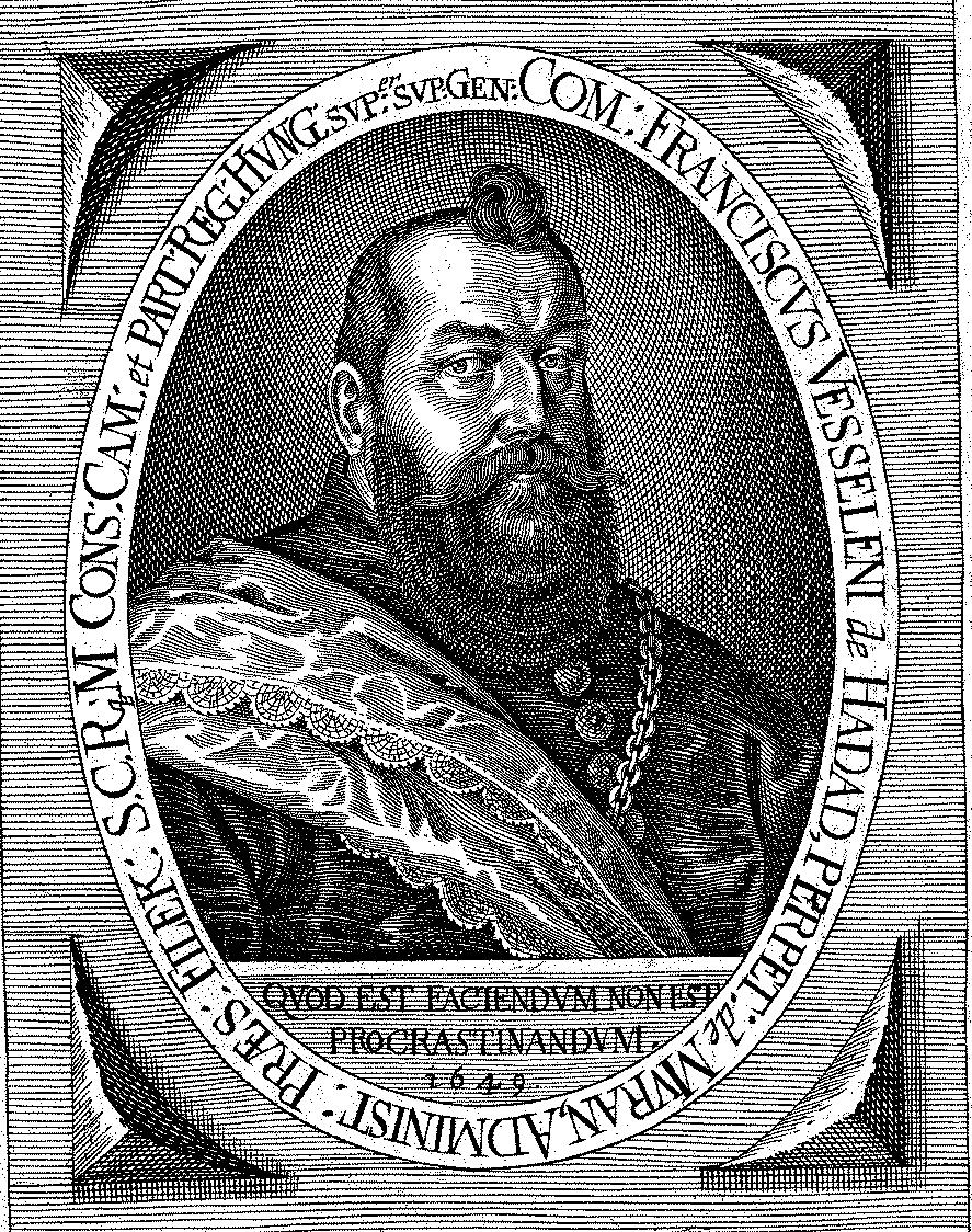 Hadadi és murányi gróf Wesselényi Ferenc (1605 – Zólyomlipcse, 1667. március 23.) magyar főnemes, hadvezér, 1655-től haláláig Magyarország nádora.